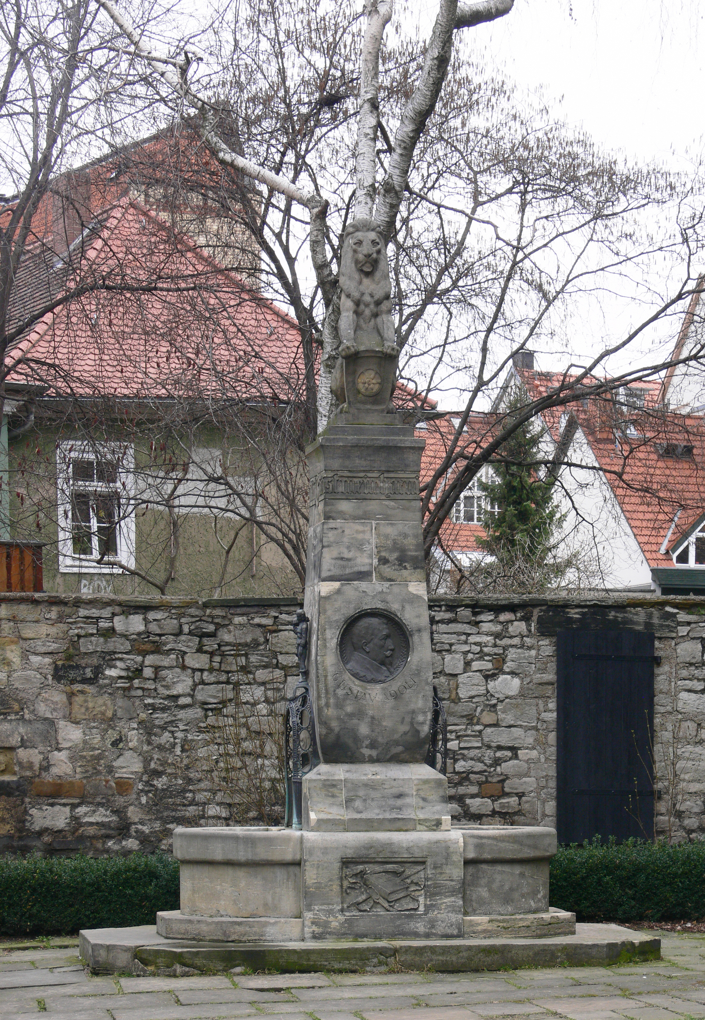 Gustav-Adolf-Brunnen von 1911 an der Predigerkirche in Erfurt